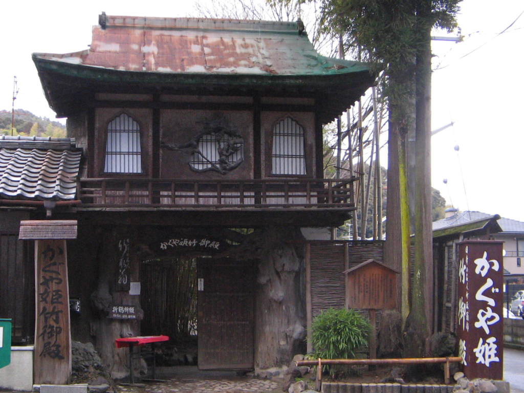 かぐや姫_竹御殿